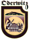 Gemeindelogo von Oderwitz